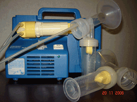 Tire-lait électrique double pompage (photo: modèle Medela Lactina) Photo réalisée par moi-même --NouvelleMaman 21 novembre 2006 à 09:40 (CET)